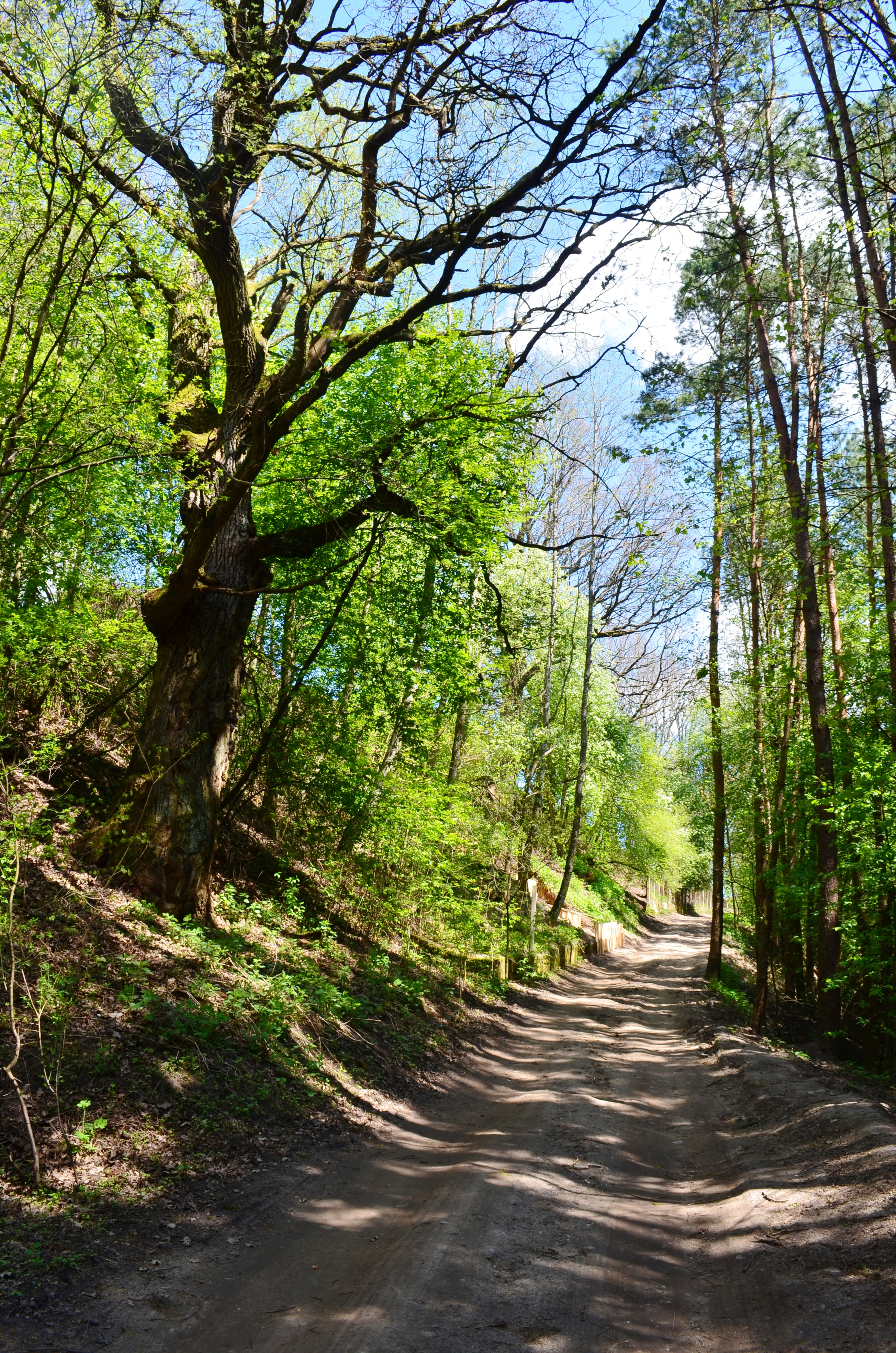 Senas ąžuolas prie keliuko Babiniai-Staviškės, Verkių sen., Vilnius